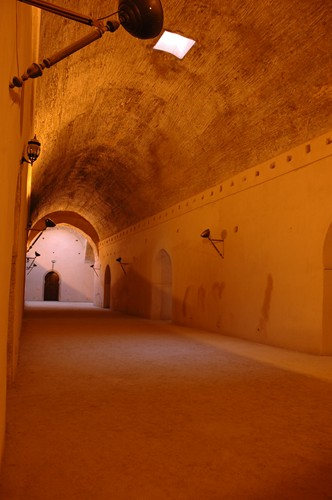 Meknès - Dar el-Ma